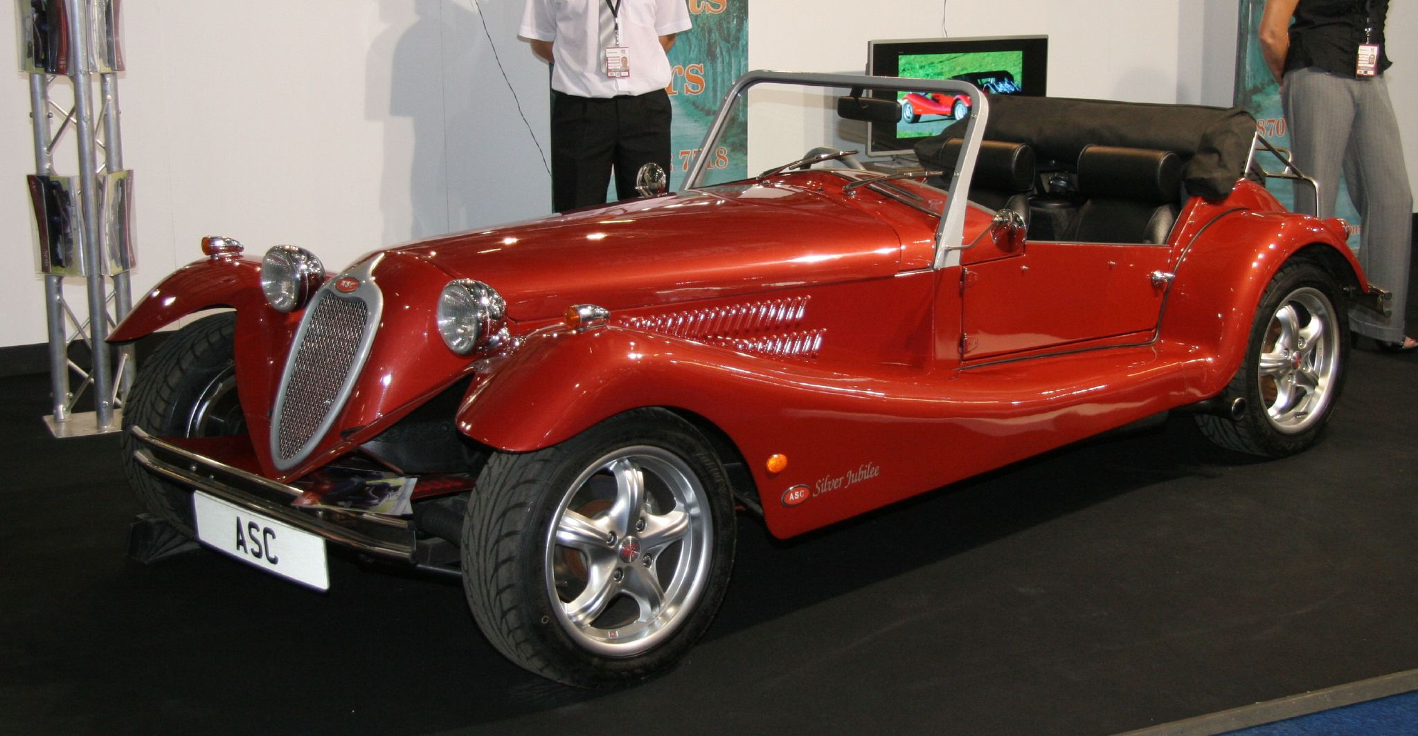 Aquila JuliettaAquila Julietta